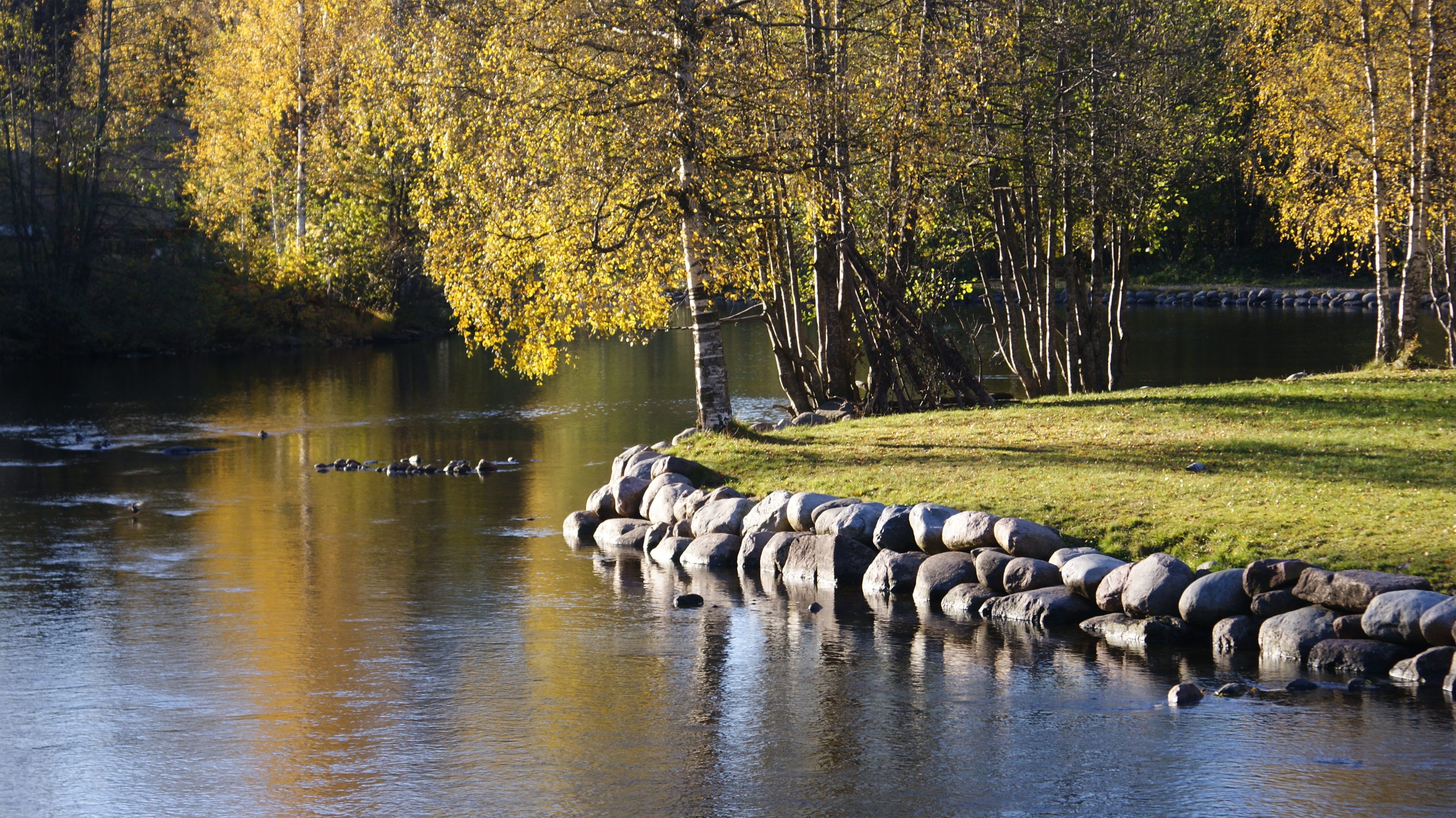 A regulated bend of Akerselva river, Kjelsås, Nordre Aker, Oslo.